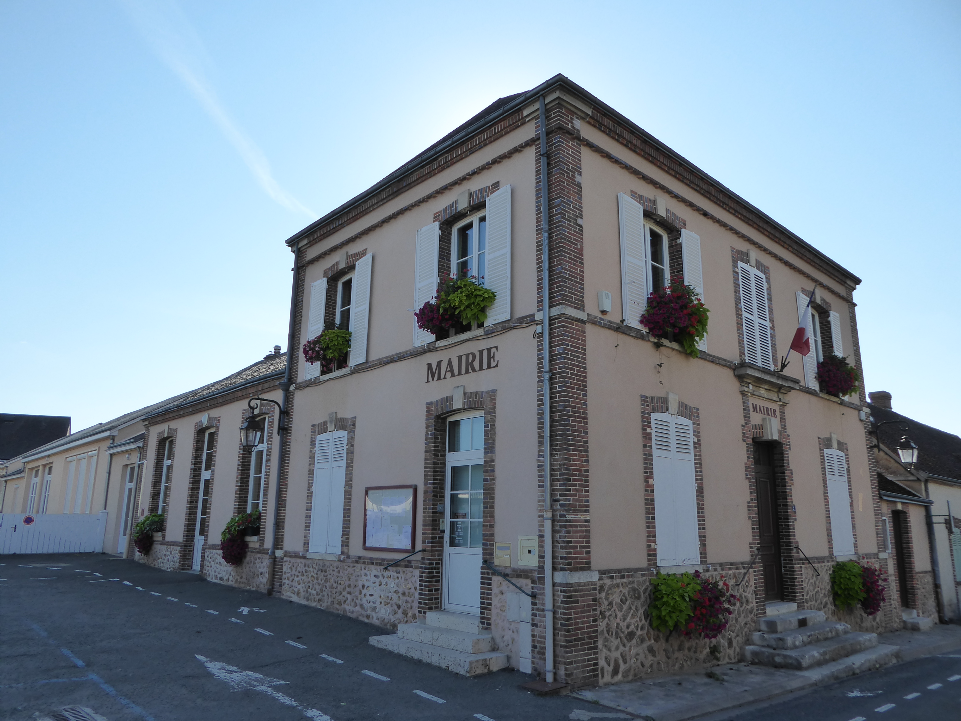 mairie, Thivars, Eure-et-Loir (France).